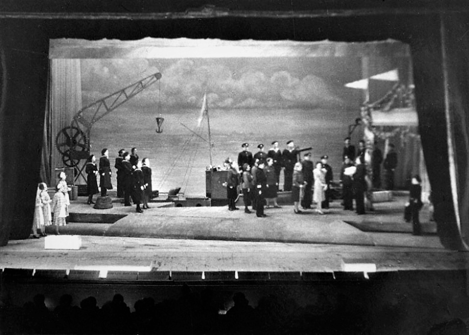 Сцена из спектакля «Раскинулось море широко» Ленинградского театра музыкальной комедии